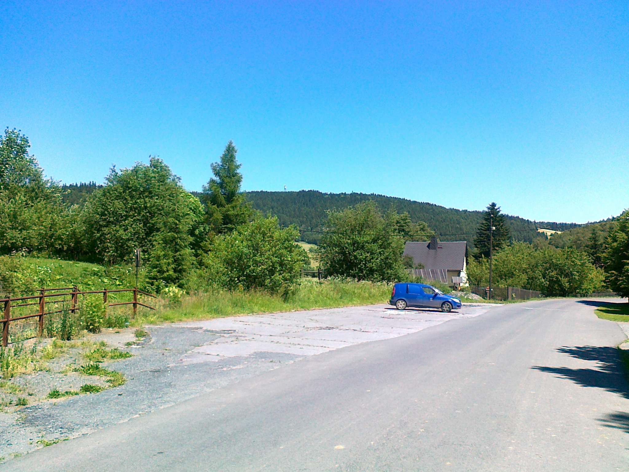 Widok z miejscowości Suchá Rudná na górę Anenský vrch